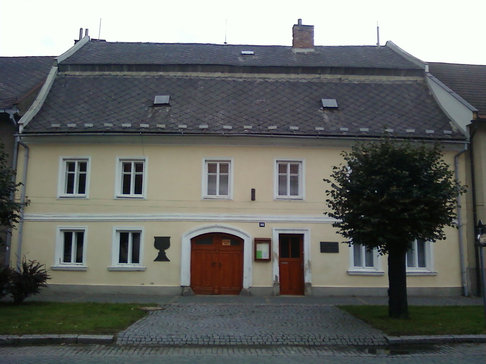 evangelická fara v Jimramově